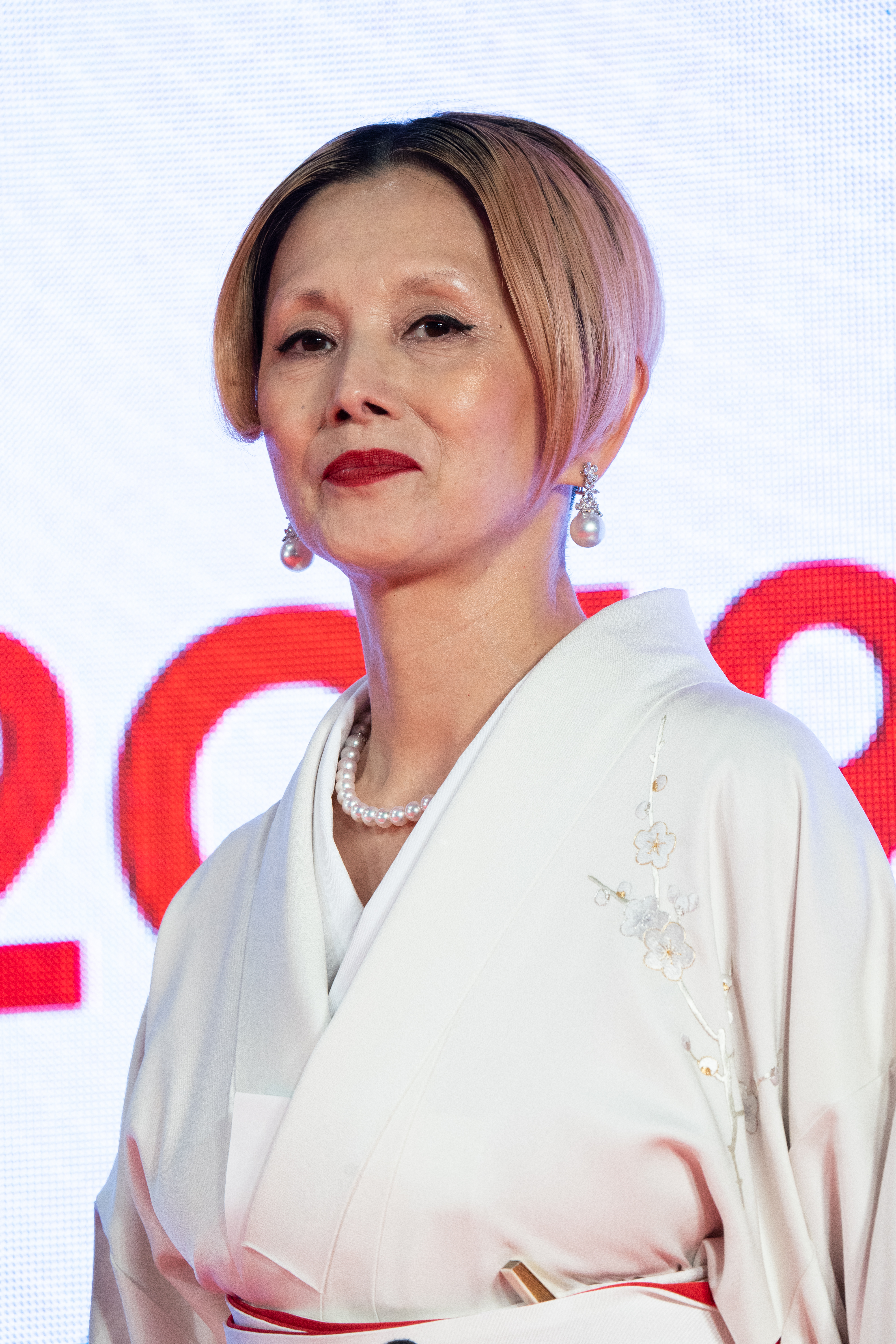 第32回 東京国際映画祭 オープニングセレモニー 夏木マリ (男はつらいよ お帰り 寅さん)